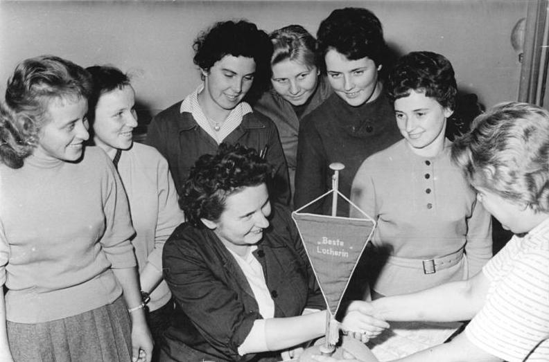 Zentralbild-Martin 6.1.1960 Hausfrauenbrigade war ausschlaggebend für ständige Mitarbeit Angeregt durch die Arbeit in einer Hausfrauenbrigade haben sich in Brandenburg viele Frauen entschlossen, ständig in der Industrie zu arbeiten. Aus einer Hausfrauenbrigade des DFD, die im Stahl- und Walzwerk Brandenburg eingesetzt war, (12 Mitglieder) haben sich 10 Frauen in den Arbeitsprozeß eingereiht und arbeiten jetzt halbtags. Ihre Kinder werden im Betriebskindergarten betreut. UBZ: Frau Elisabeth Däubert (sitzend) arbeitet als Locherin in der Aritma im Stahl- und Walzwerk. Schon mehrmals wurde sie mit dem Wanderwimpel als Siegerin im Quartalswettbewerb ausgezeichnet. Ihre Kolleginnen beglückwünschen sie zu ihrem Erfolg.